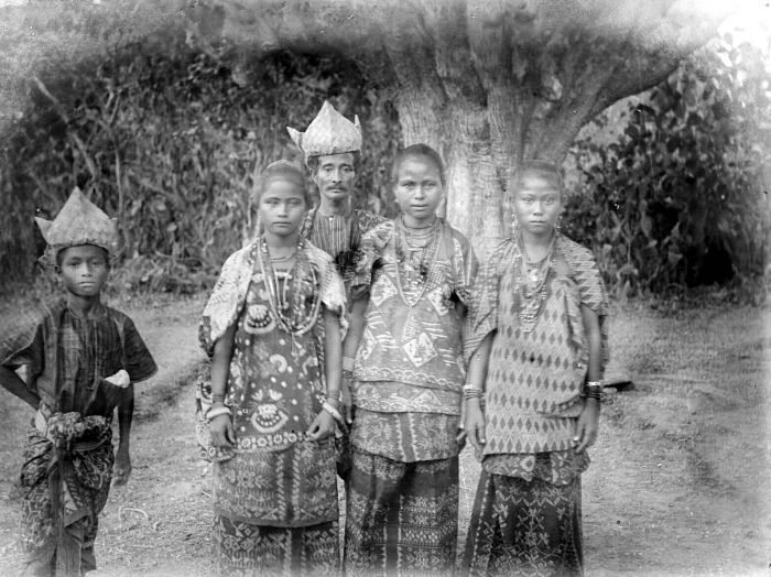 Negatief. De Radja van Bilba met zijn gezin, Roti